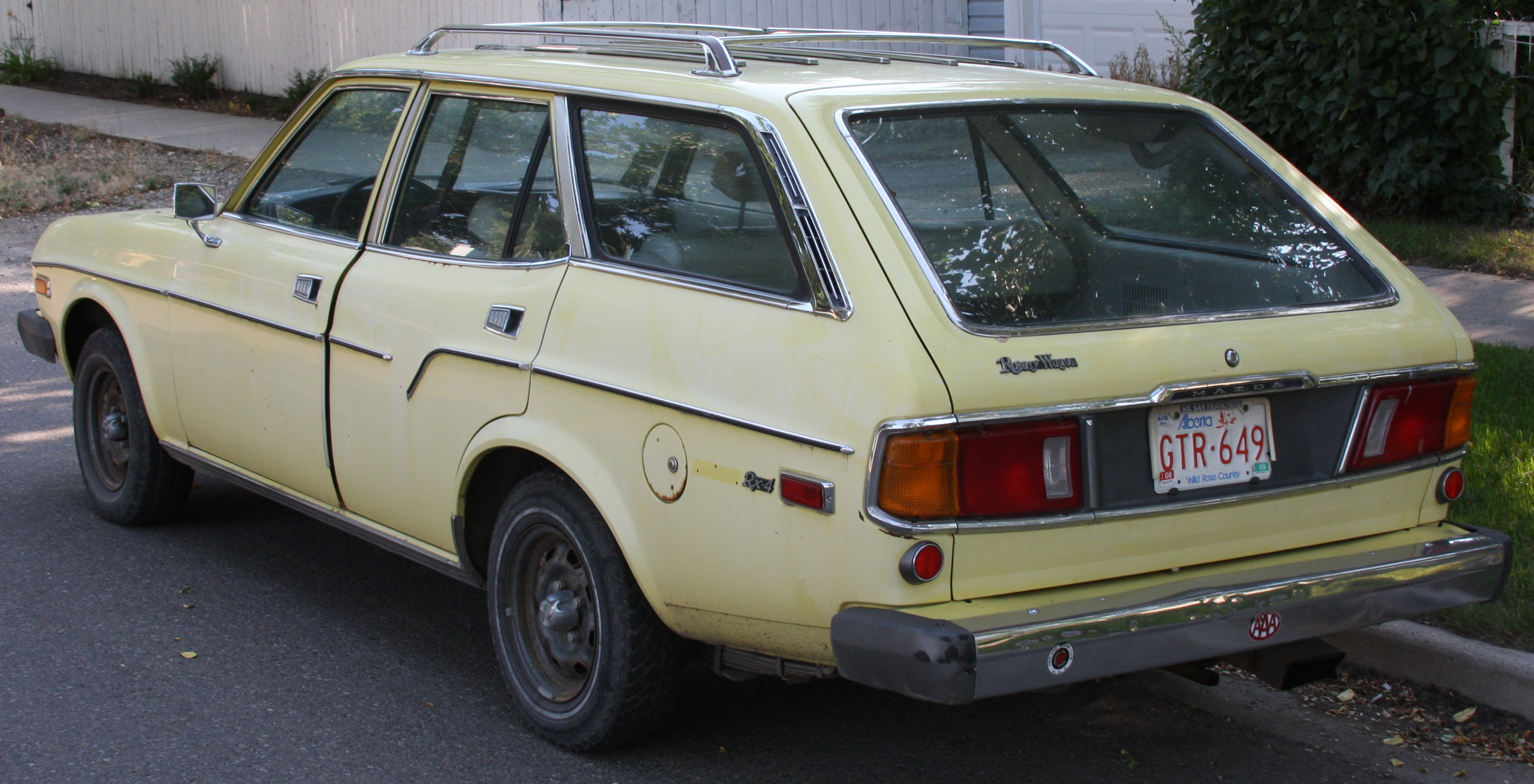 Mazda Rx-4 Wagon